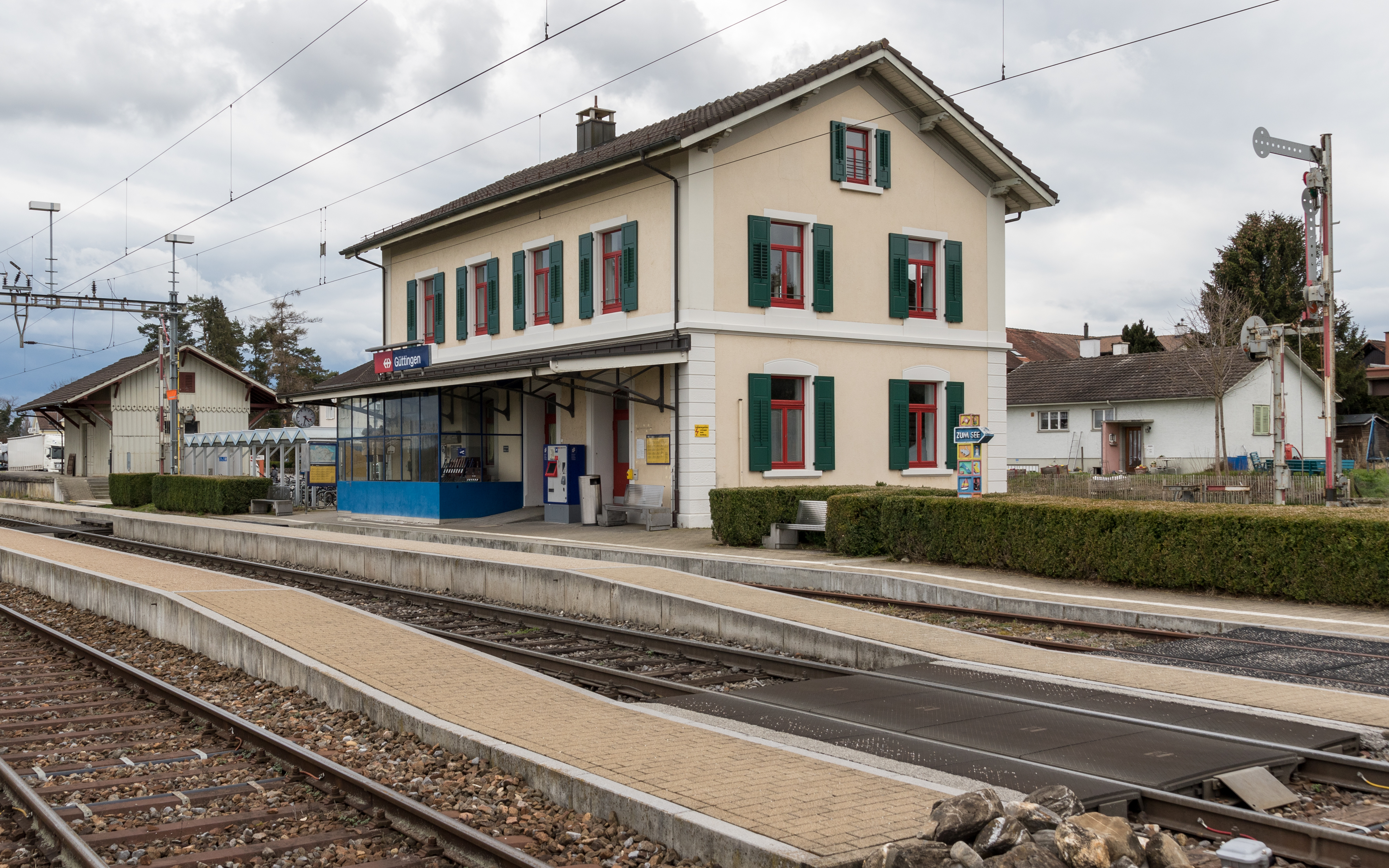 Bahnhof Güttingen an der Strecke Kreuzlingen - Romanshorn